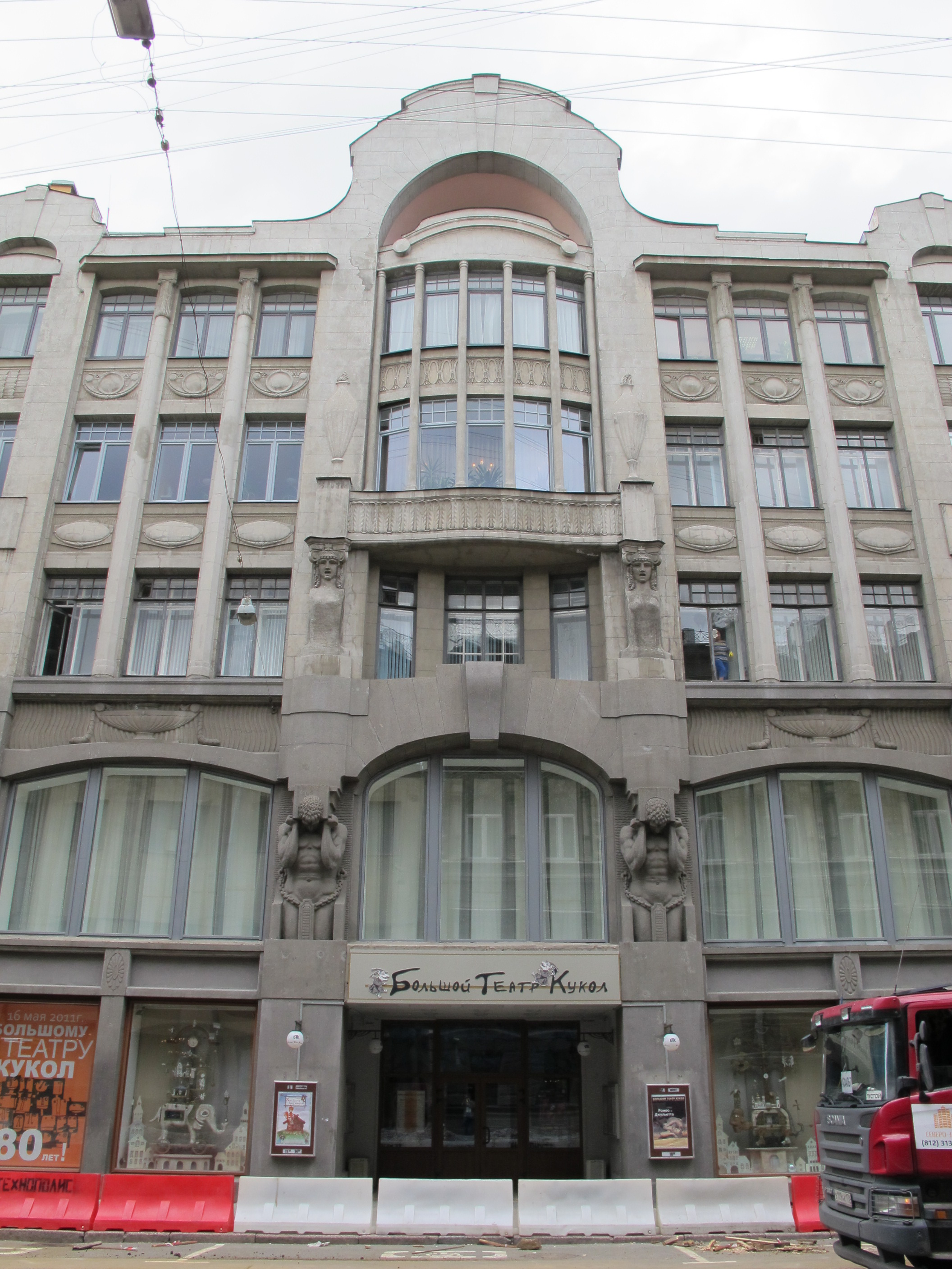 Palazzo ulitsa nekrasova